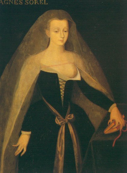 Portrait inspiré de la Vierge du diptyque de Melun